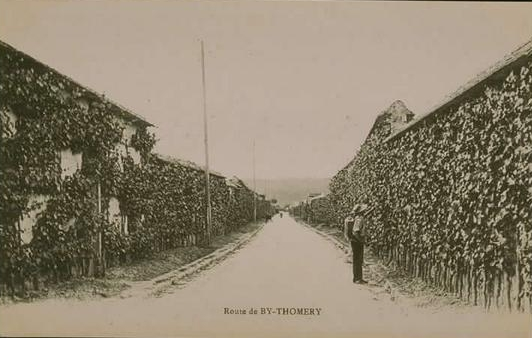 Culture du chasselas de Thomery vers 1900 sur les murs en espaliers entre BY et Thomery en Seine-et-Marne, France.